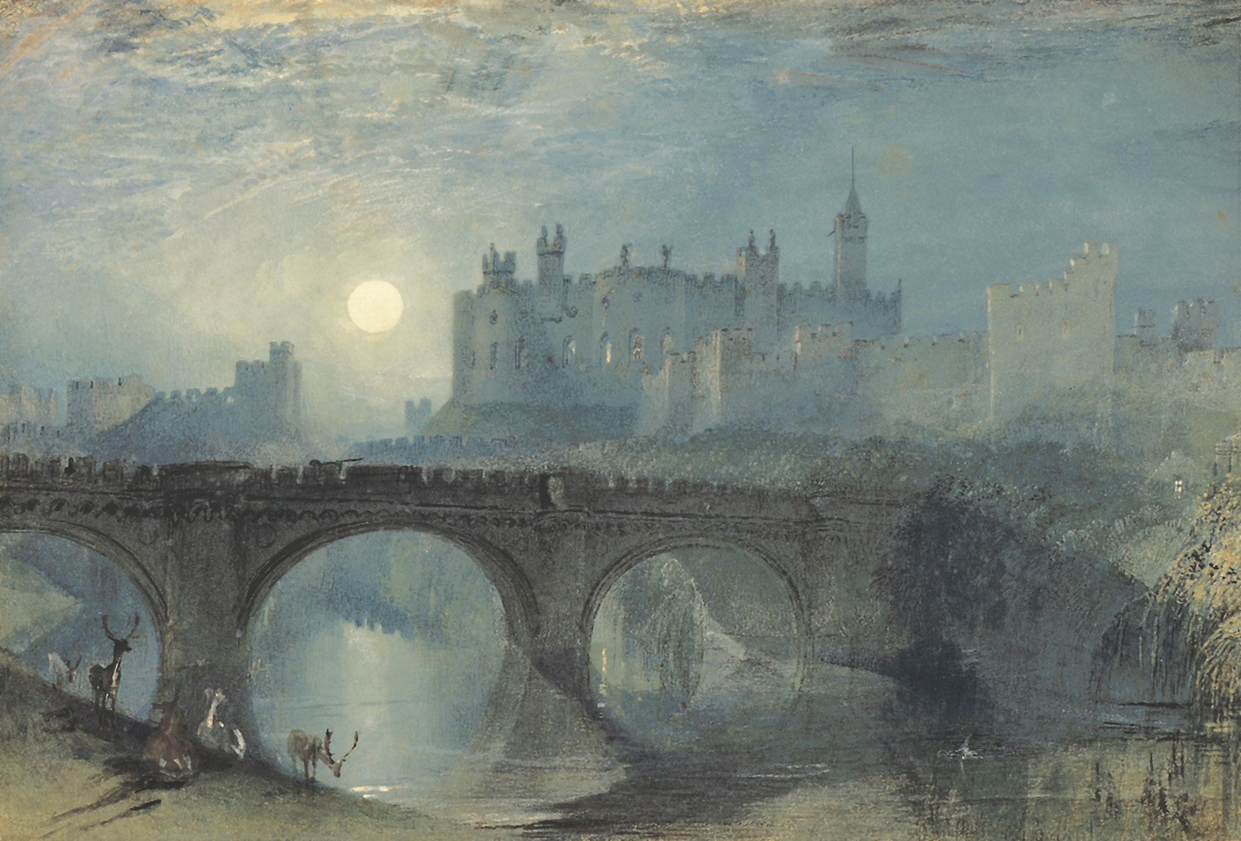 Alnwick Castle